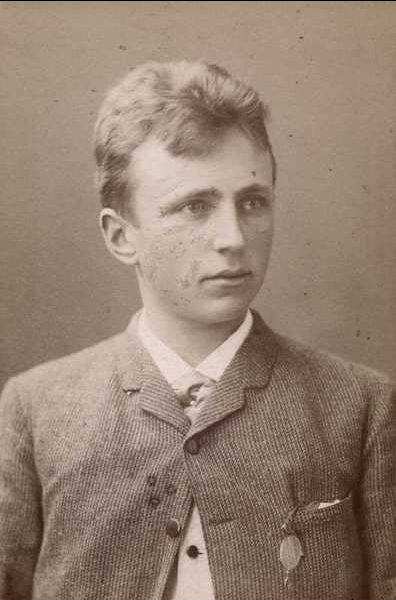 Nils Vogt